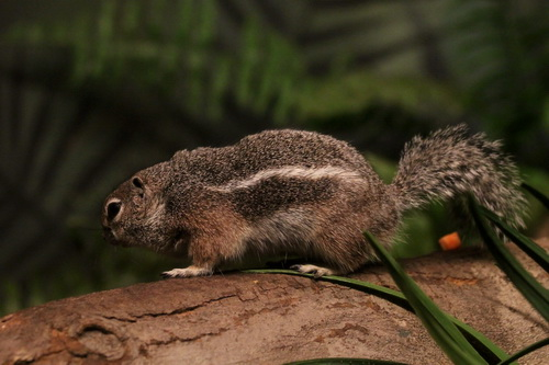 Антилоповый суслик Харриса (Ammospermophilus harrisii), зоопарк Бронкс, Нью-Йорк (Bronx Zoo, New York)